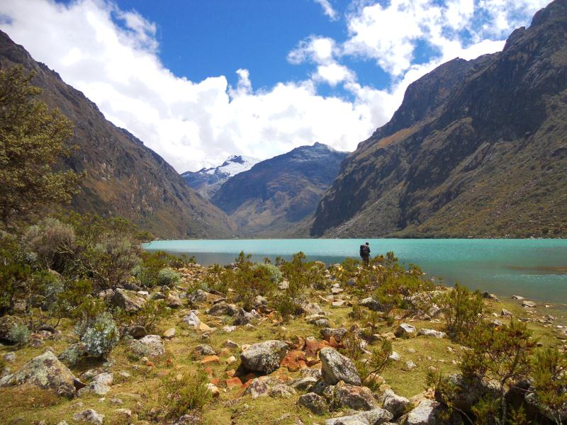 Nationalpark Huascarán